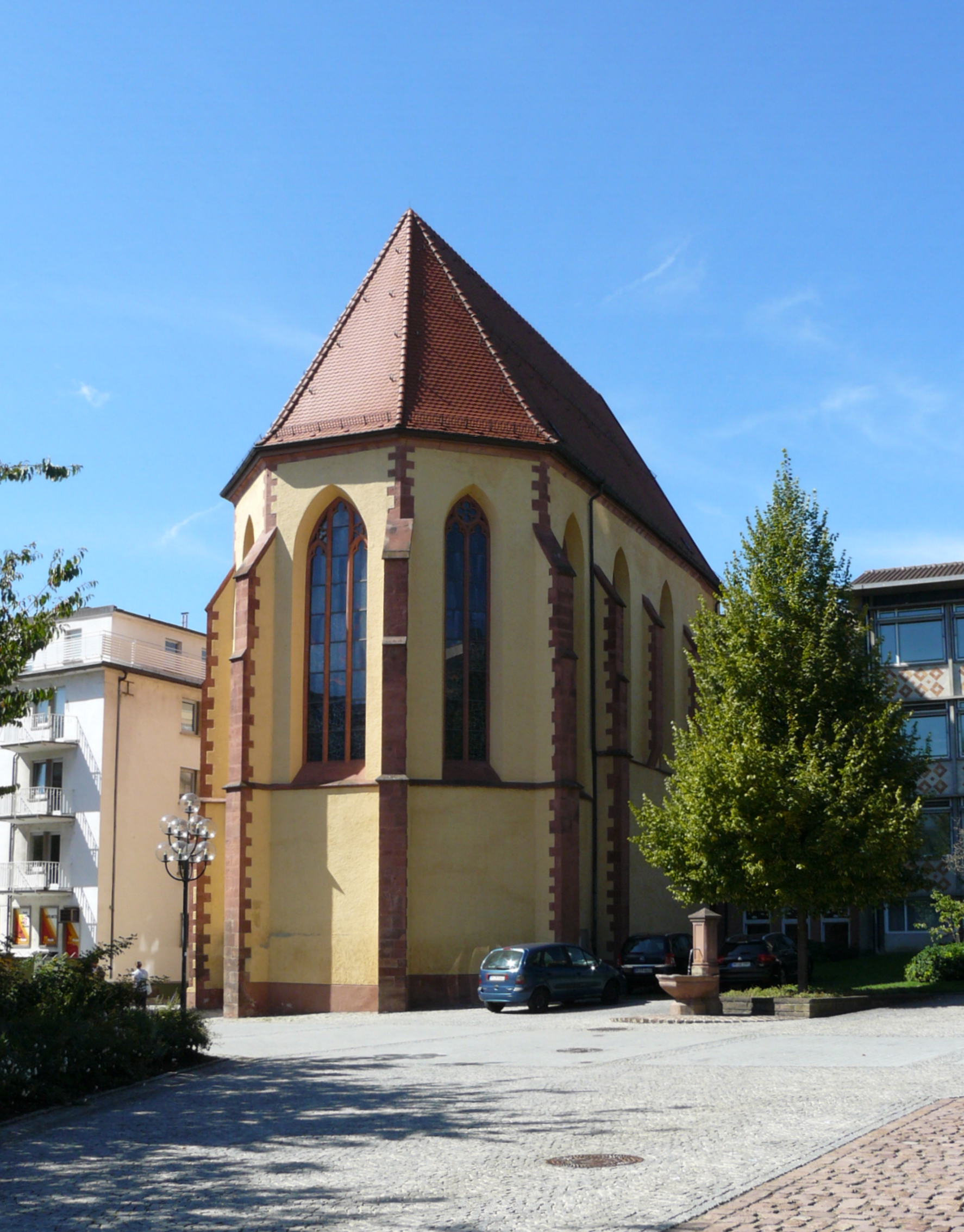 Katholische Barfüßerkirche in Pforzheim